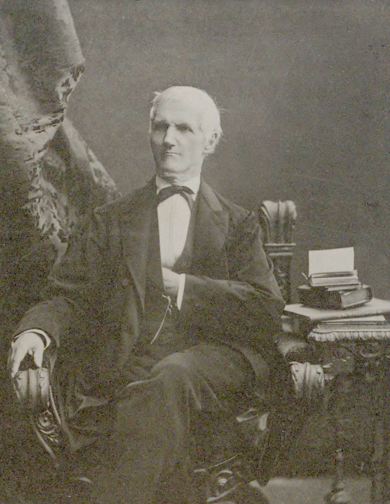 Porträt: Anton Menge (* 15. Februar 1808 in Arnsberg in Westfalen; † 27. Januar 1880 in Danzig) Aus: Anton Menge und Johann Heinrich Robert Göppert: Die Flora des Bernsteins und ihre Beziehungen zur Flora der Tertiärformation... W. Engelmann, Danzig 1883